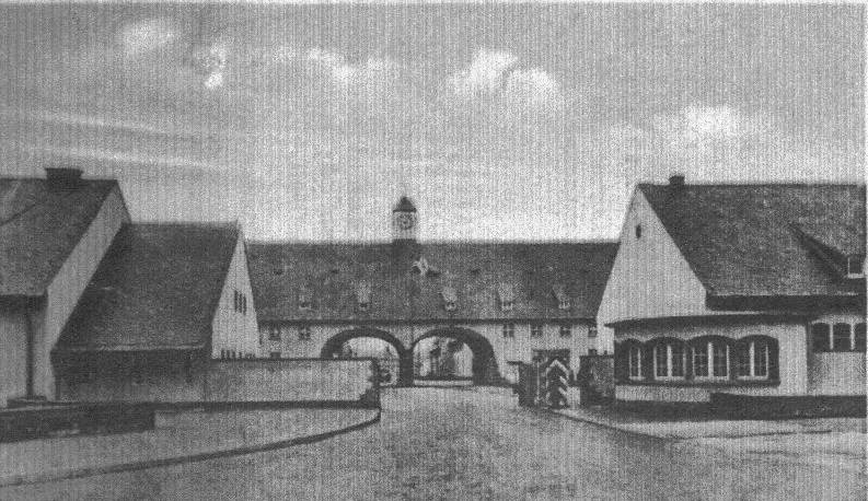 Frankenfurt Bockenheim, Eingang zur ehemaligen Flakkaserne, nach dem Zweiten Weltkrieg teilzerstört, dann Eingang zum sog. Industriehof